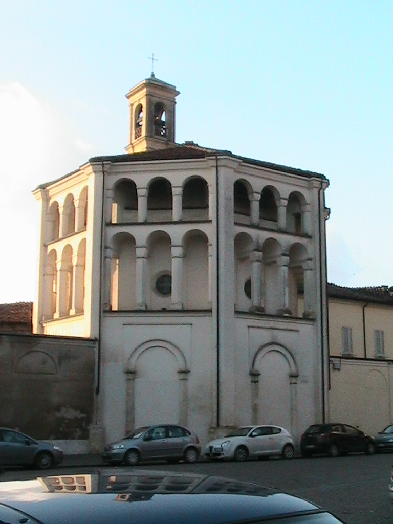 Casalmaggiore - Chiesa di Santa Chiara